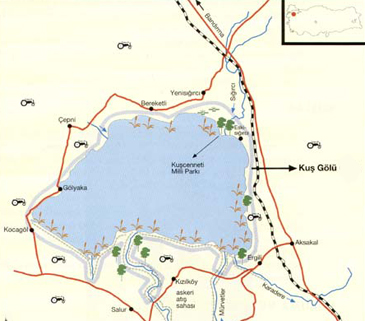 Lago Manyas, en la provincia de Balikesir (Turquía).